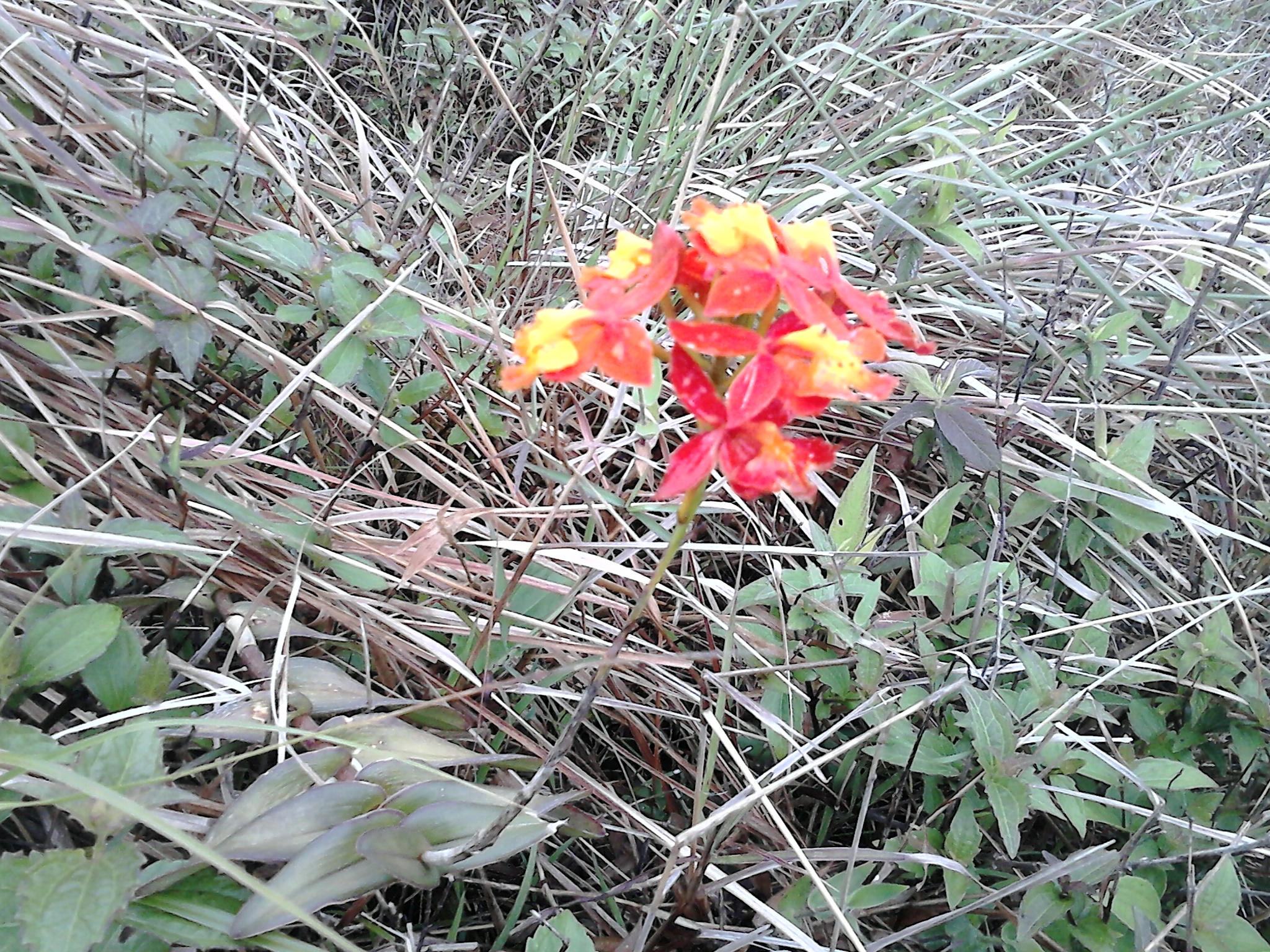 Epidendrum radicans in Refugio Silvestre Peñas Blancas, in Costa Rica